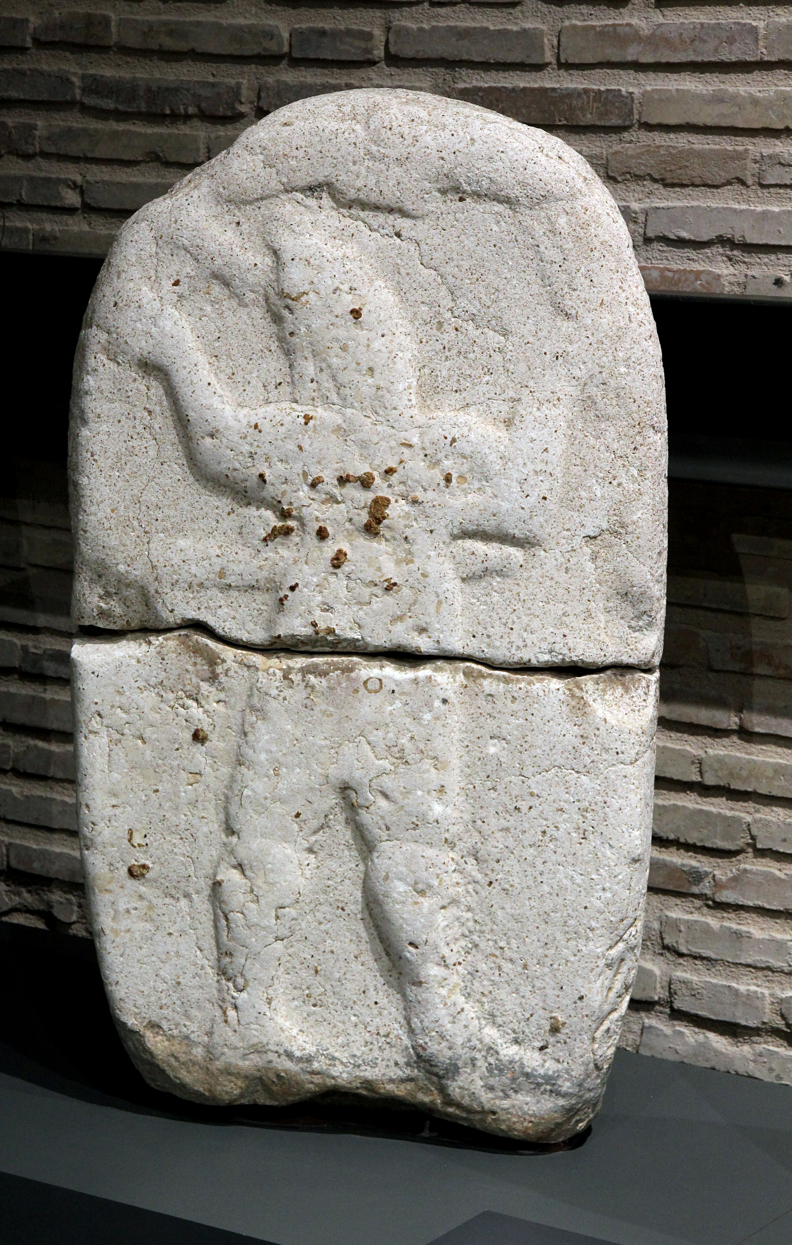 Archäologisches Museum Adana, Südtürkei, späthethitische Stele Maraş B/5